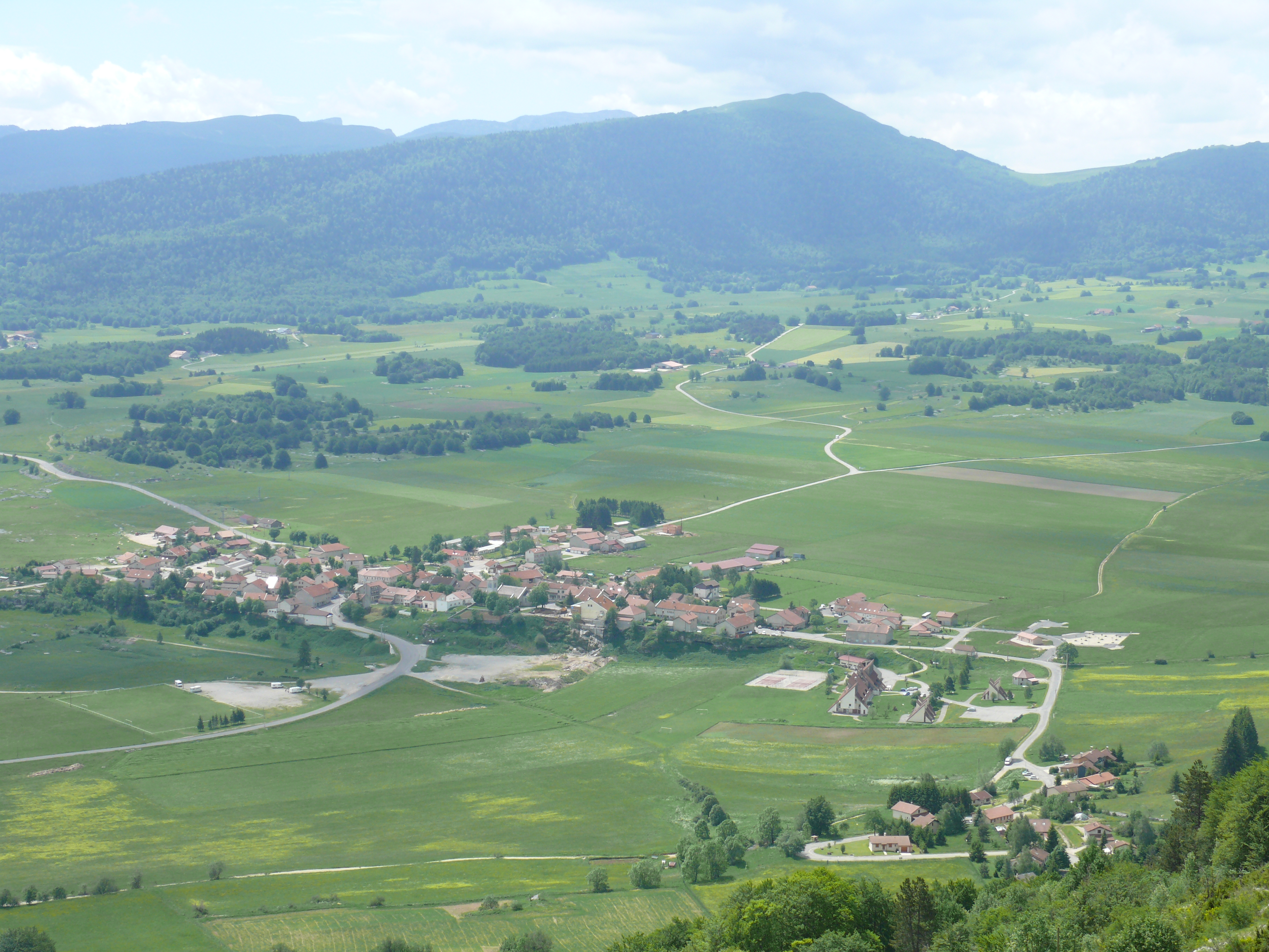 Vassieux-en-Vercors - Le village vu du Mémorial de la Résistance